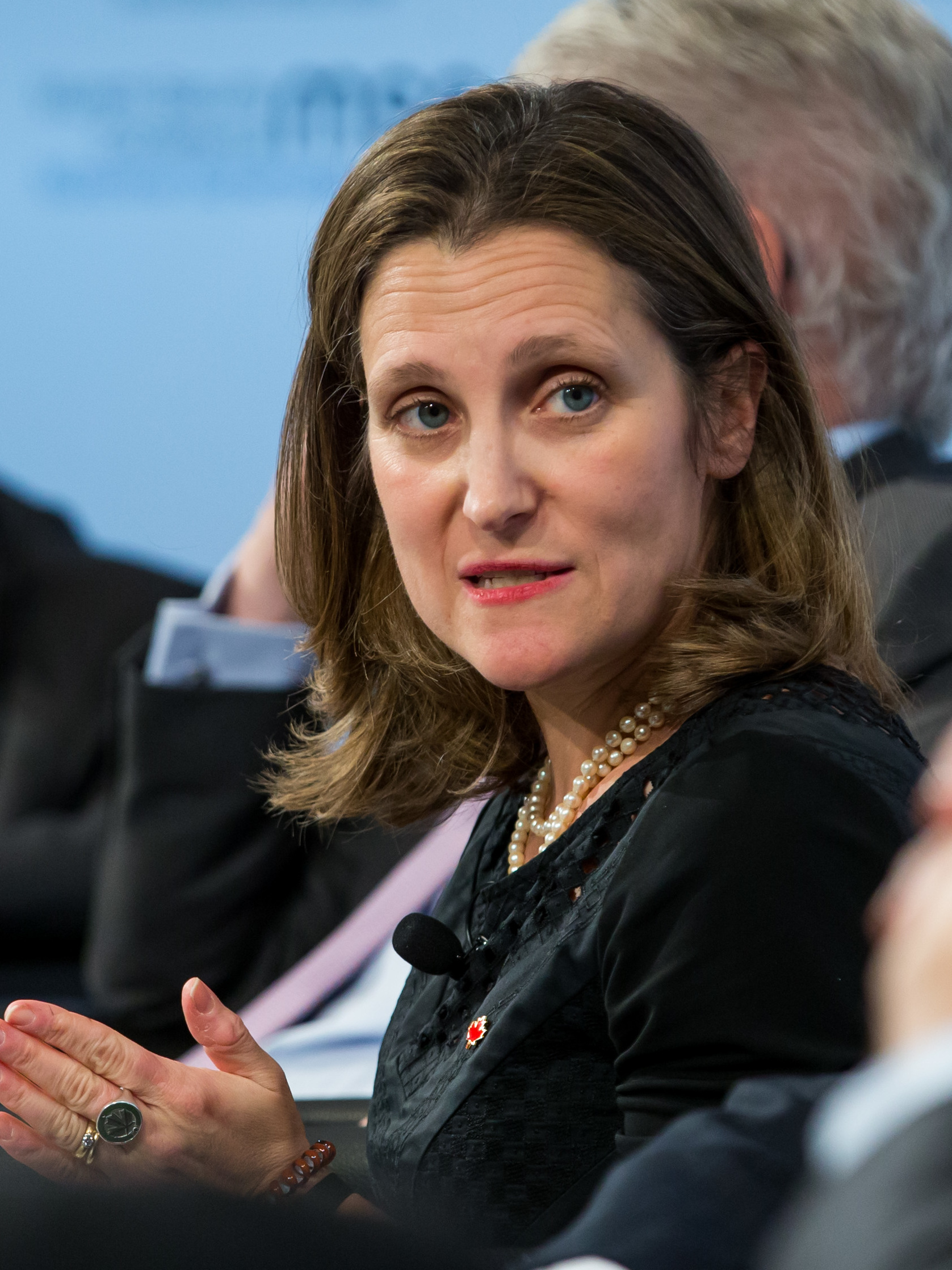 Chrystia Freeland während der Münchener Sicherheitskonferenz 2018